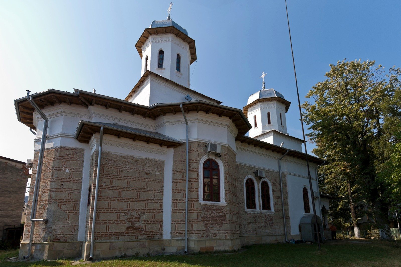 Fotografia prezinta ansamblului bisericii "Sf. Mina" vazut dinspre N.